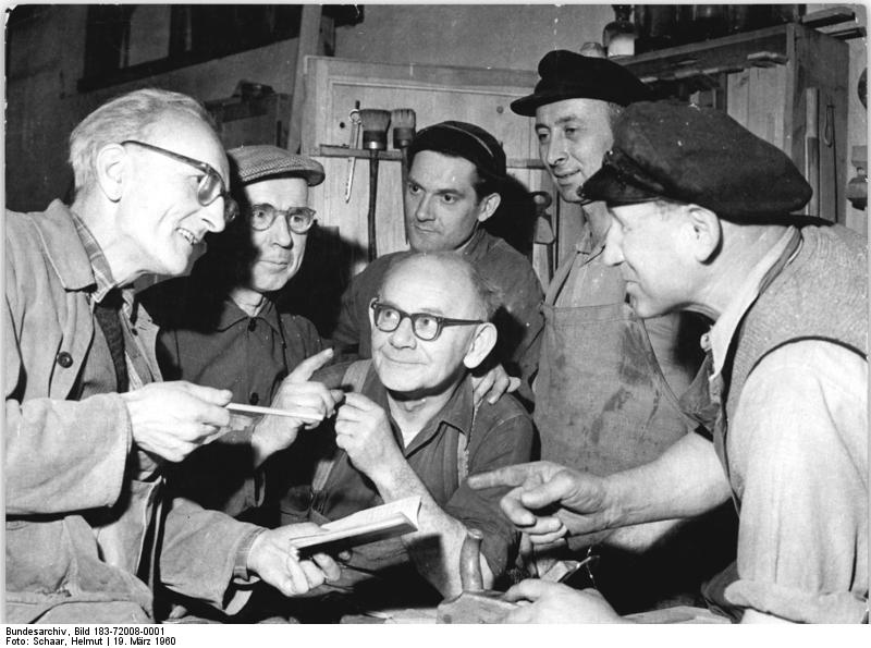 Zentralbild-Schaar-Zü-Qu-19.3.1960 Schreibender Arbeiter im Kombinat Espenhain.Der Tischler Heinrich Rünzel (links) im Kreise seiner Brigade "Aufbau",der Bauabteilung des Kombinats Espenhain, ist Mitglied des Zirkels "Schreibender Arbeiter". Er führt das Brigadetagebuch und wurde im Februar dafür ausgezeichnet, da er im Wettbewerb um die Führung der Brigade-Tagebücher des Kombinats am besten abschnitt."